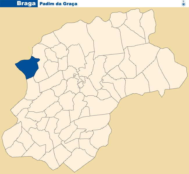 Localização de Padim da Graça no concelho de Braga.